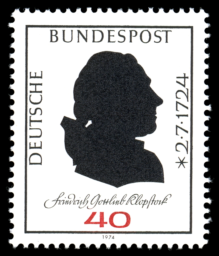 Stamp description / Briefmarkenbeschreibung Ausgabepreis: 40 Pfennig First Day of Issue / Erstausgabetag: 15.Mai 1974 Auflage: 30.650.000 Entwurf: Sauer Druckverfahren: Offsetdruck Michel-Katalog-Nr: Ländercode-MiNr: 809